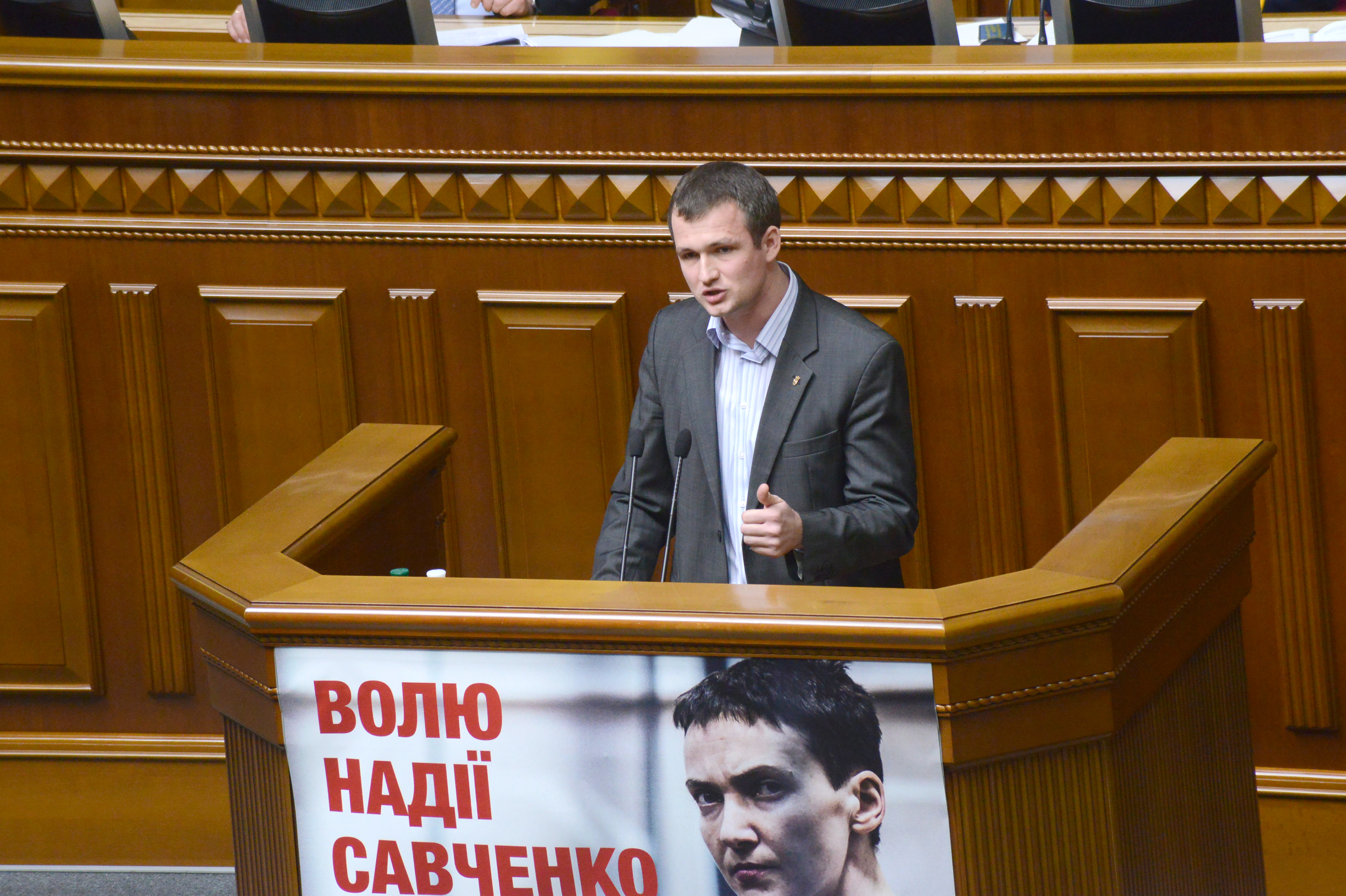 ВЕРХОВНА РАДА УКРАЇНИ 2015 фотограф Вадим Чуприна